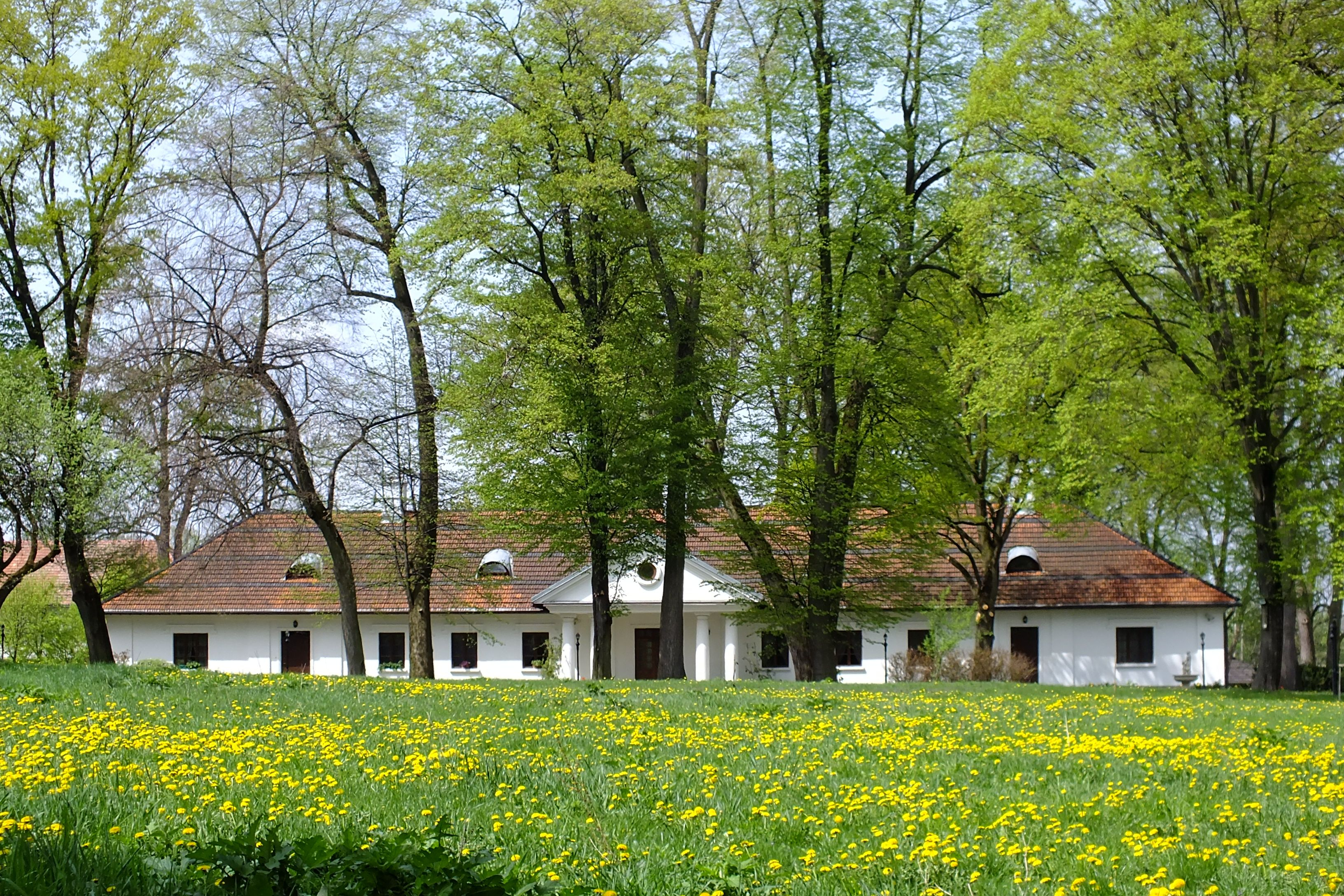 Dwór w Krościenku Wyżnym